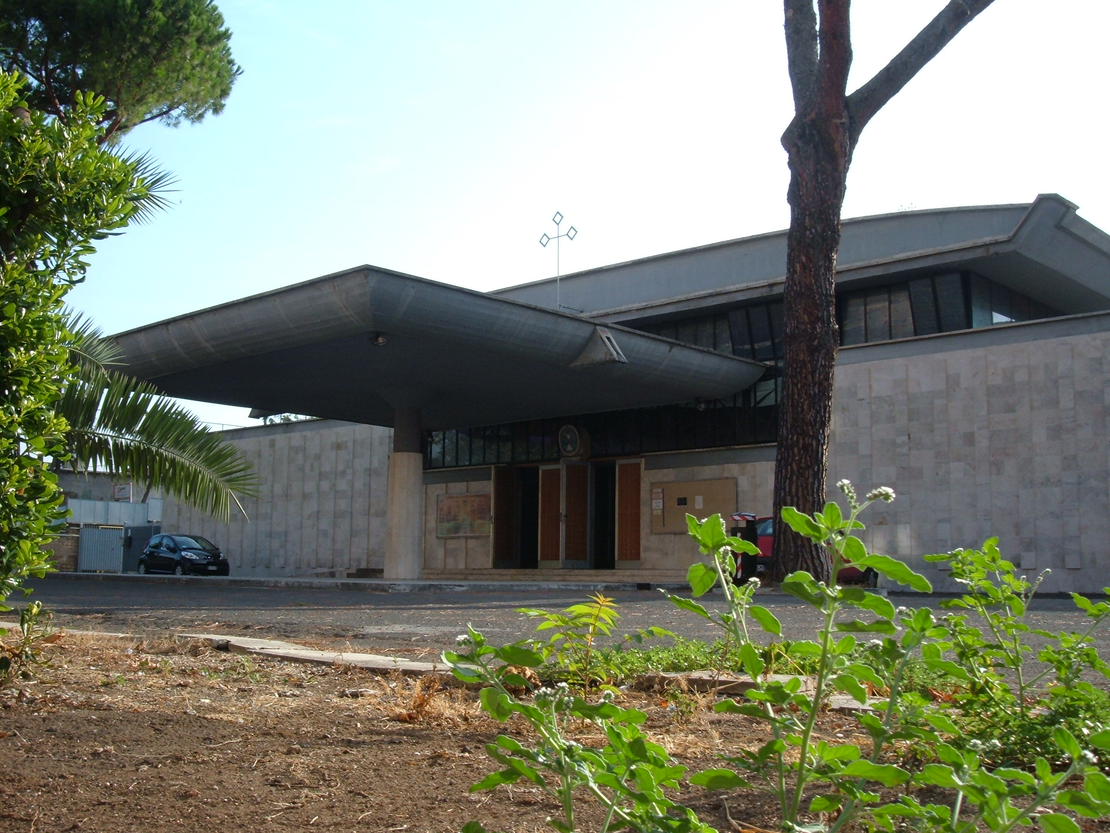 Chiesa parrocchiale di San Giovanni Crisostomo, a Roma, nel quartiere Monte Sacro Alto, in via Emilio De Marchi.